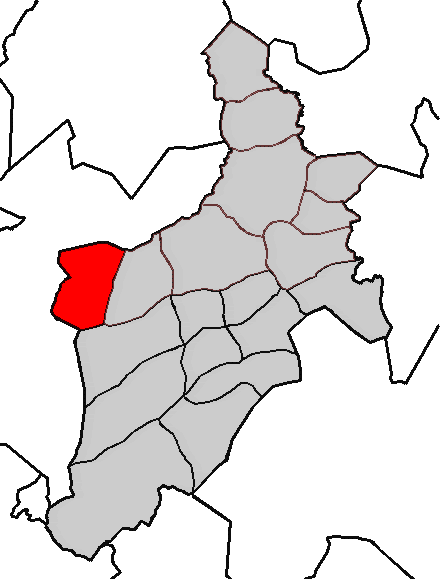 Situación da parroquia de Sarandós no concello de Abegondo